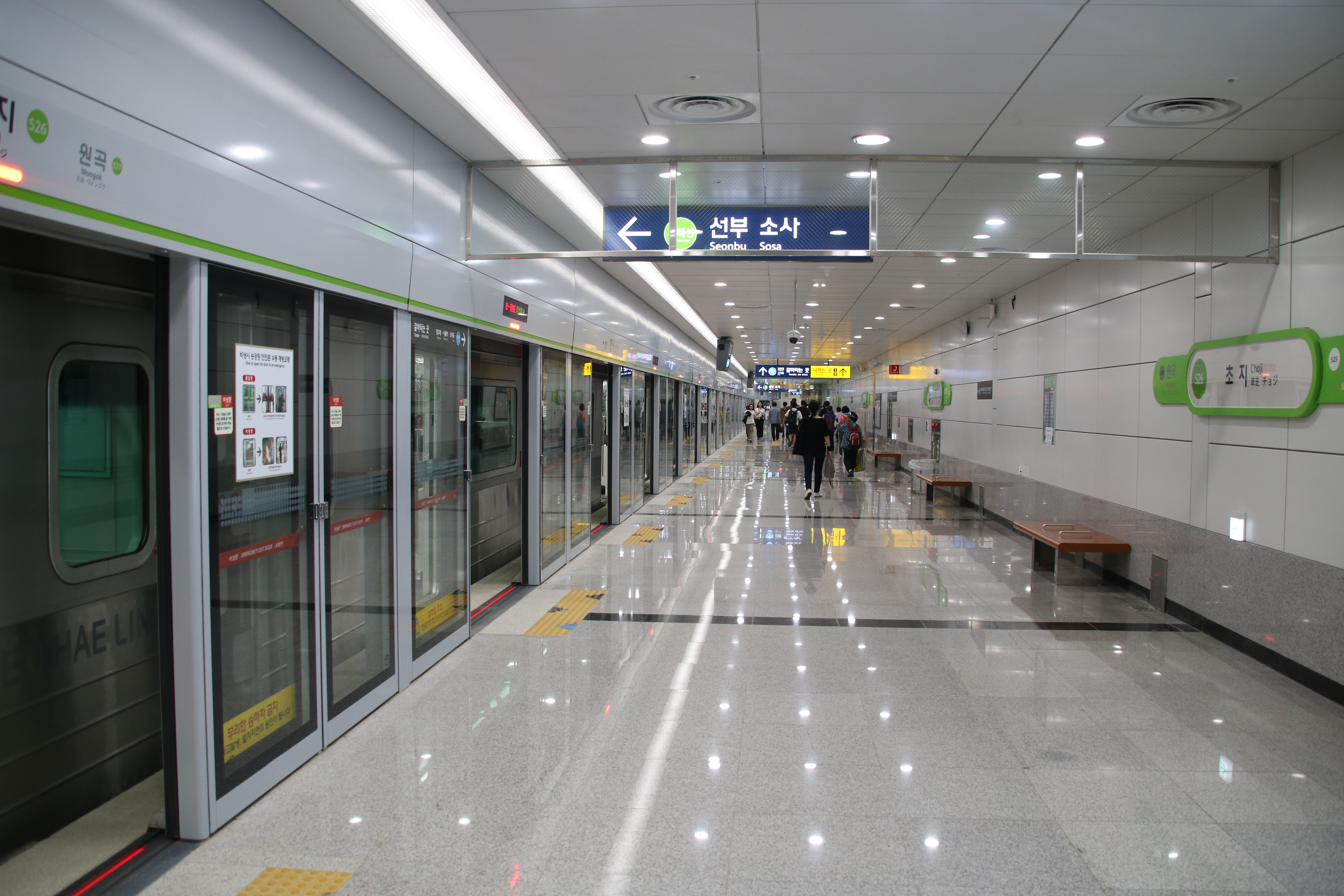 서해선 초지역 승강장